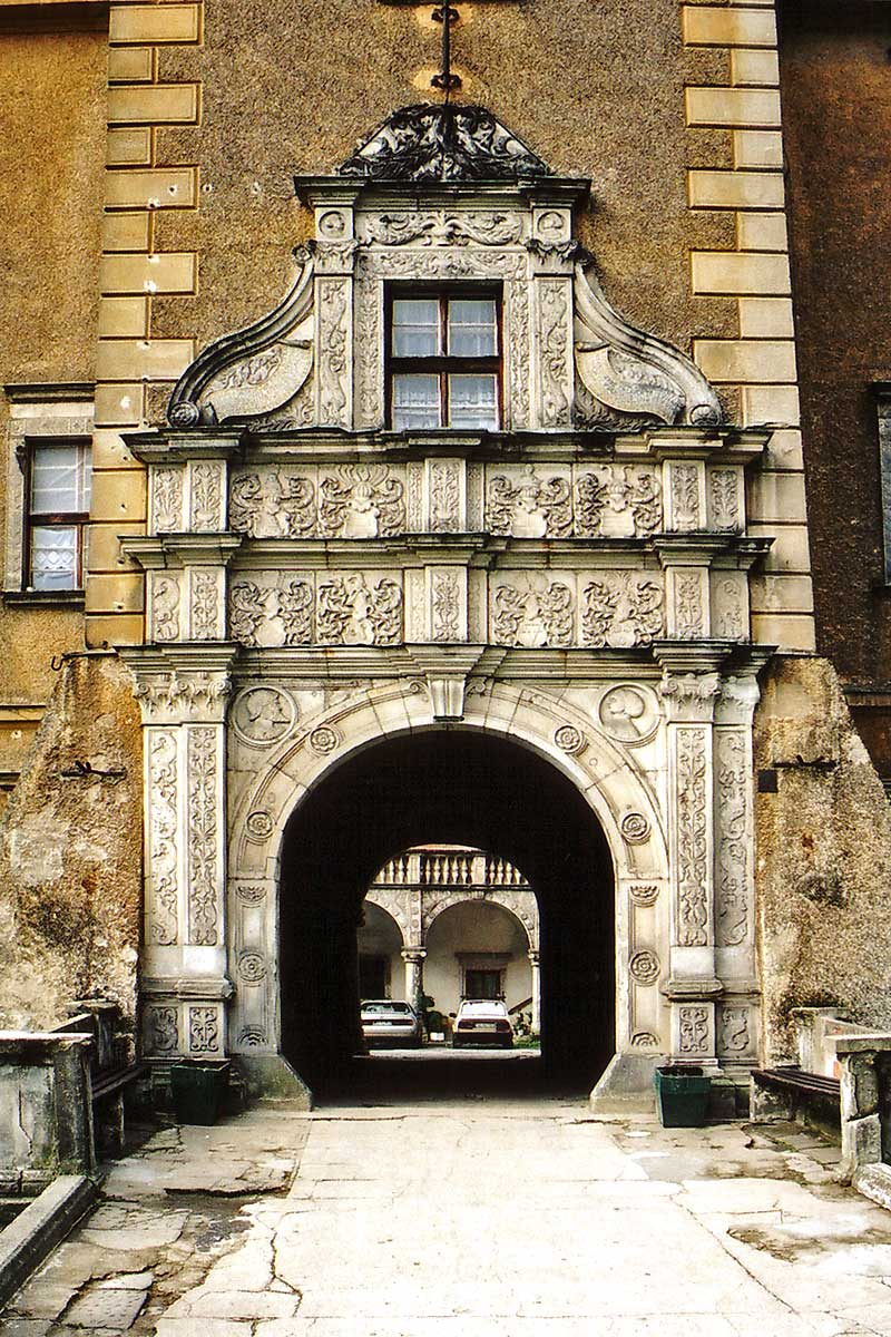 Zamek w Płakowicach - portal